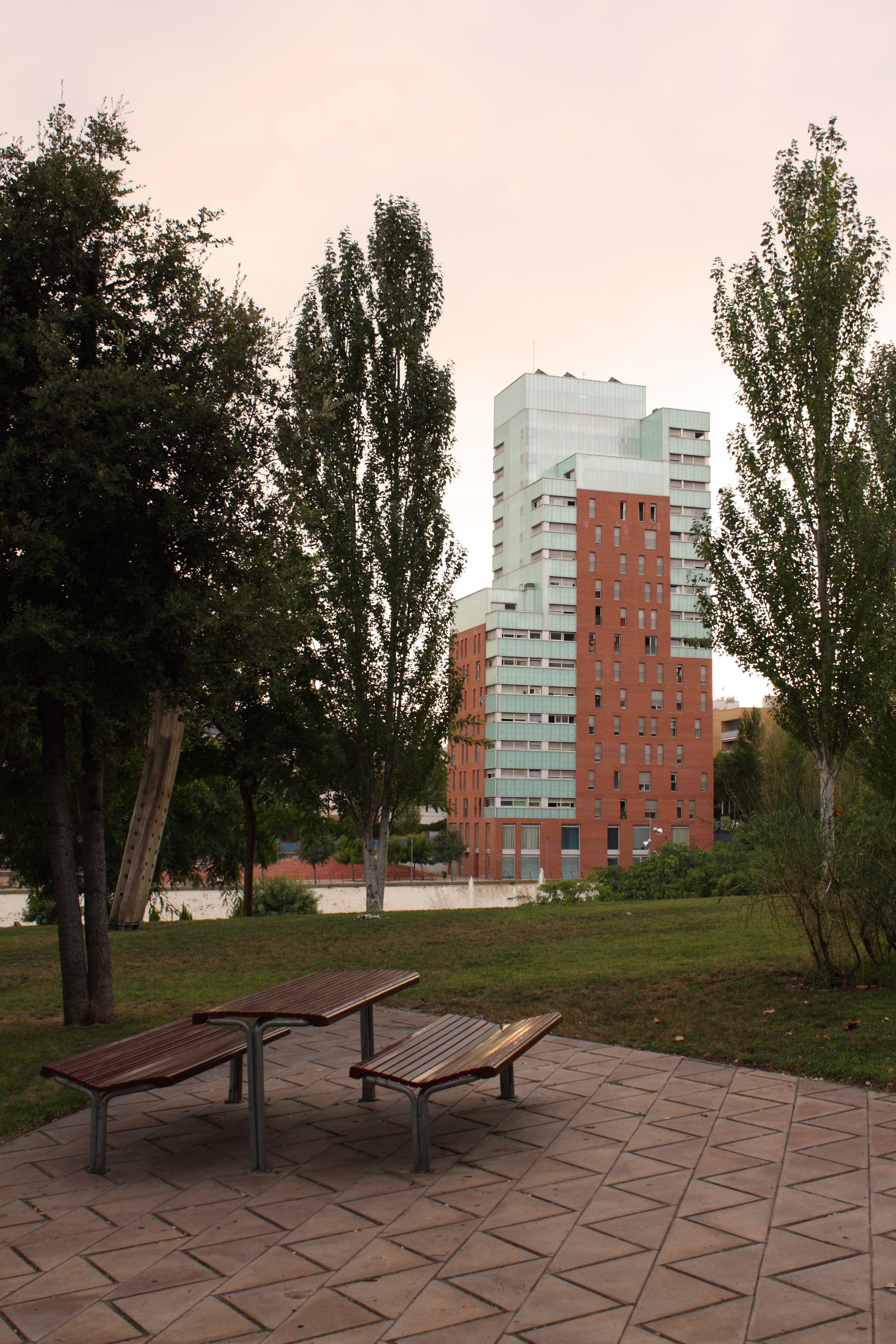 Parc Central de Nou Barris, situat al barri de la Guineueta, i edifici singular del Passeig d'Urrutia, 17-47, situat a un extrem del barri de Can Peguera (Nou Barris)